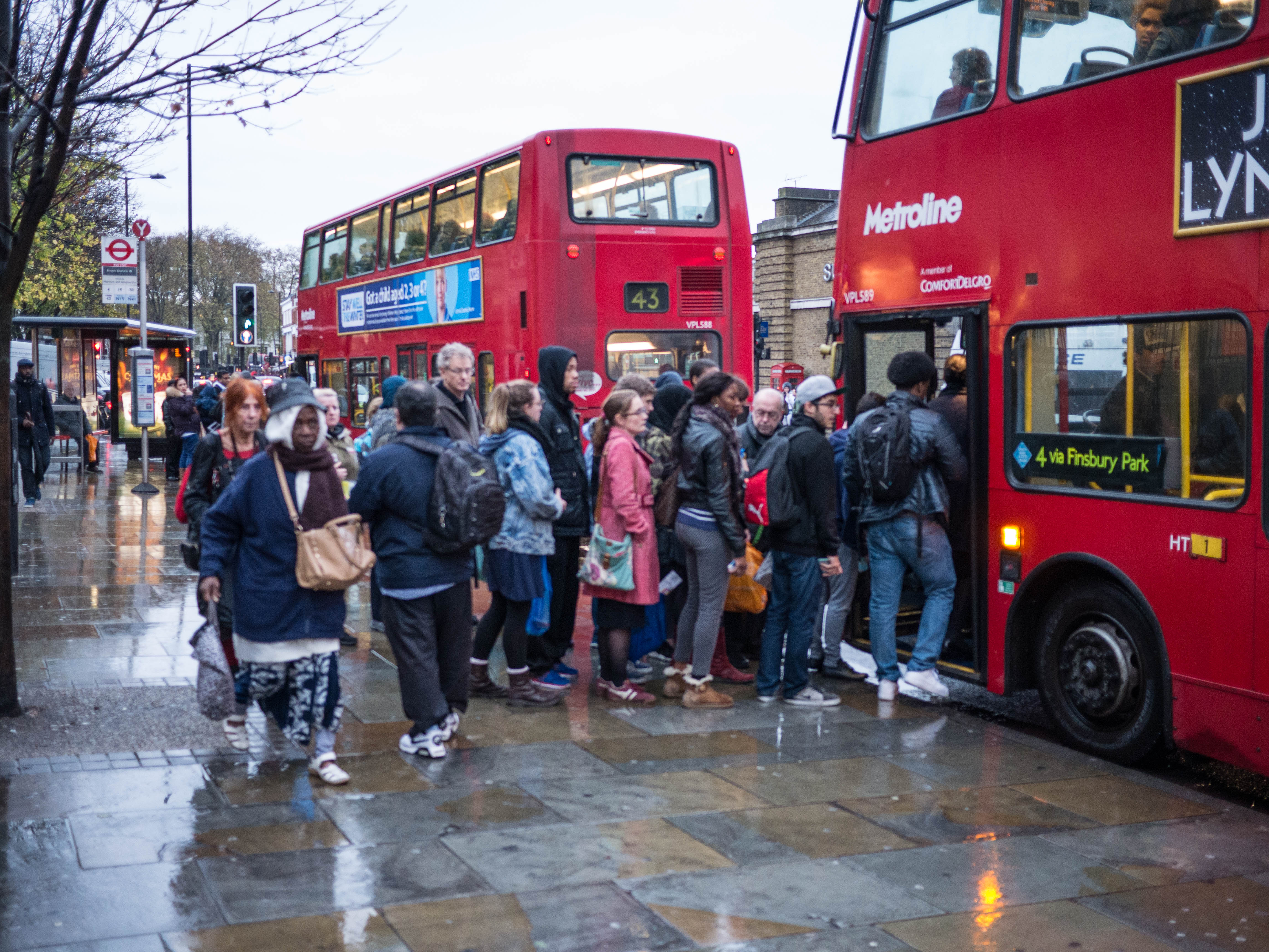 Angel Scrum 2